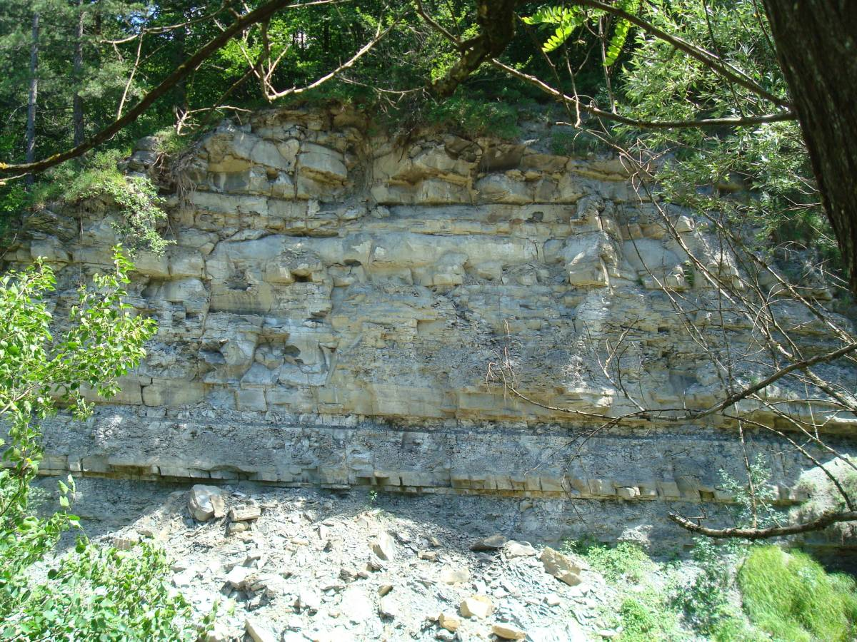 Couche du terrain "Marneux-arénacé" dans la région de Bagno di Romagna en oprovince d'Emilie-Romagne en Italie du nord